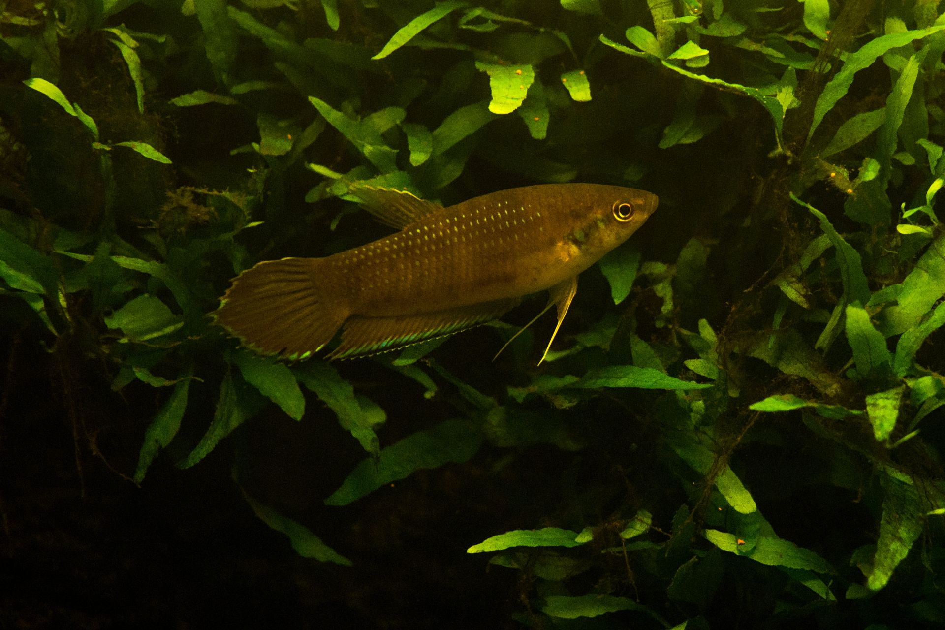 Pijnacker, 4-feb-2014